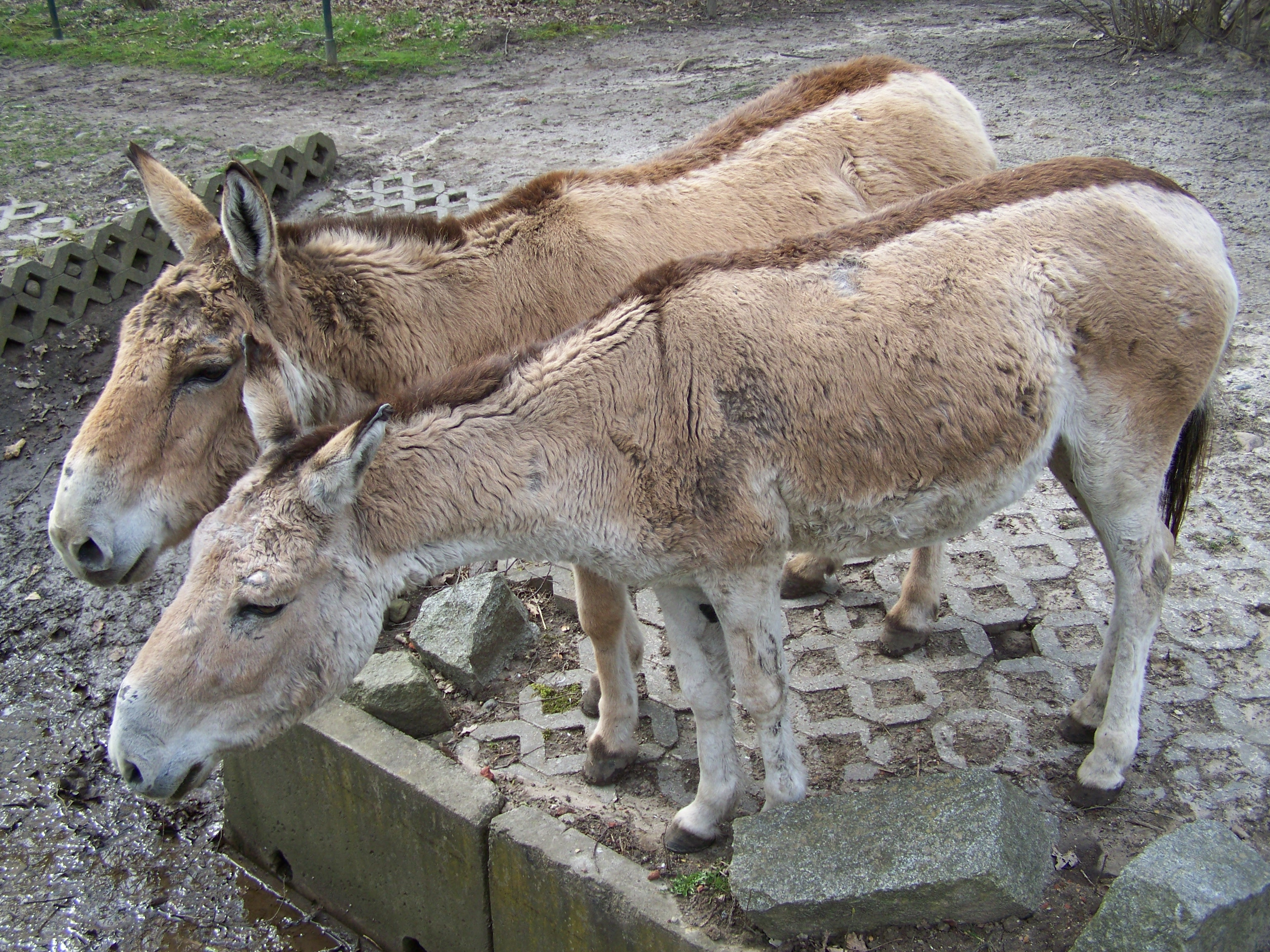 Equus hemionus